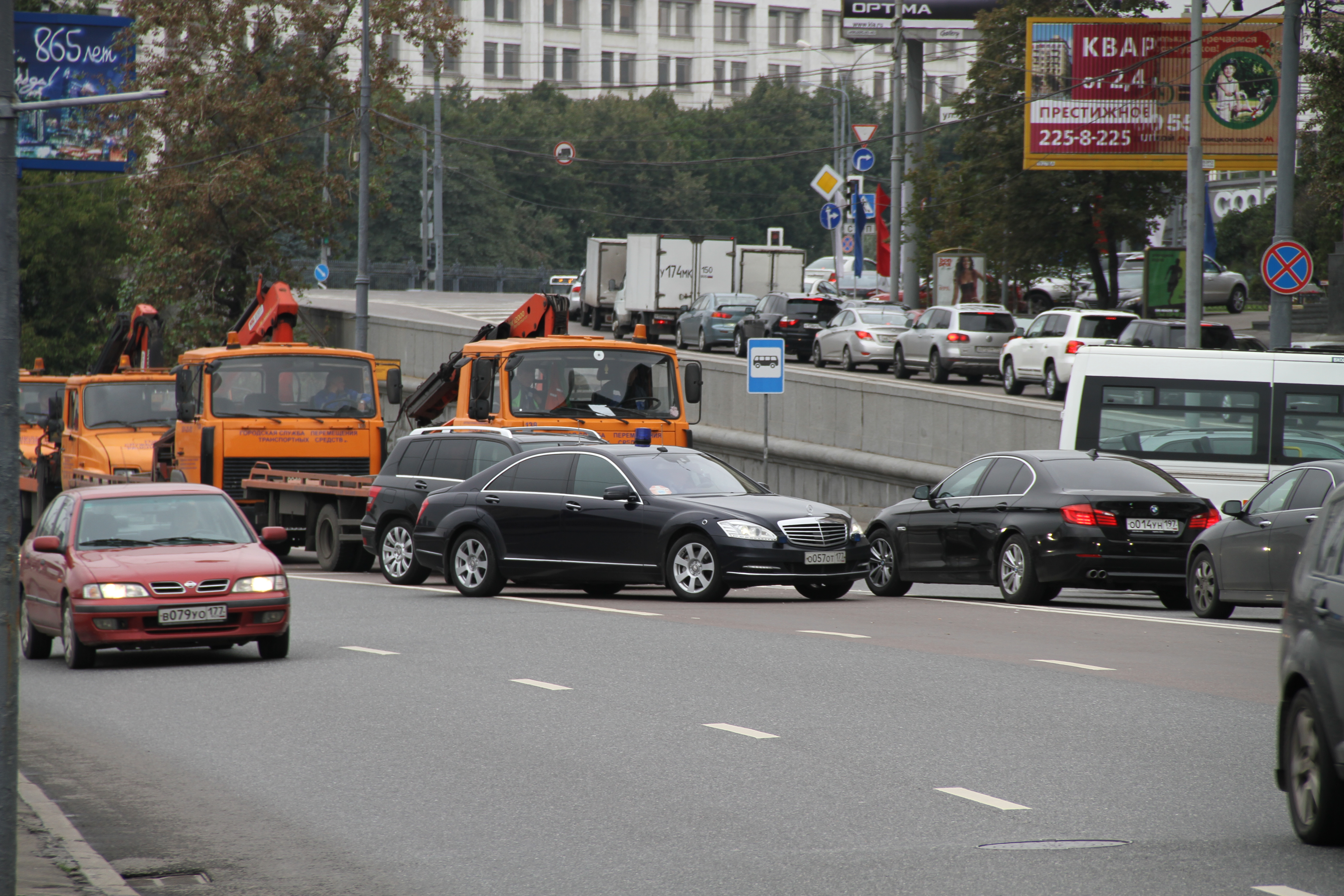 Движение в Москве